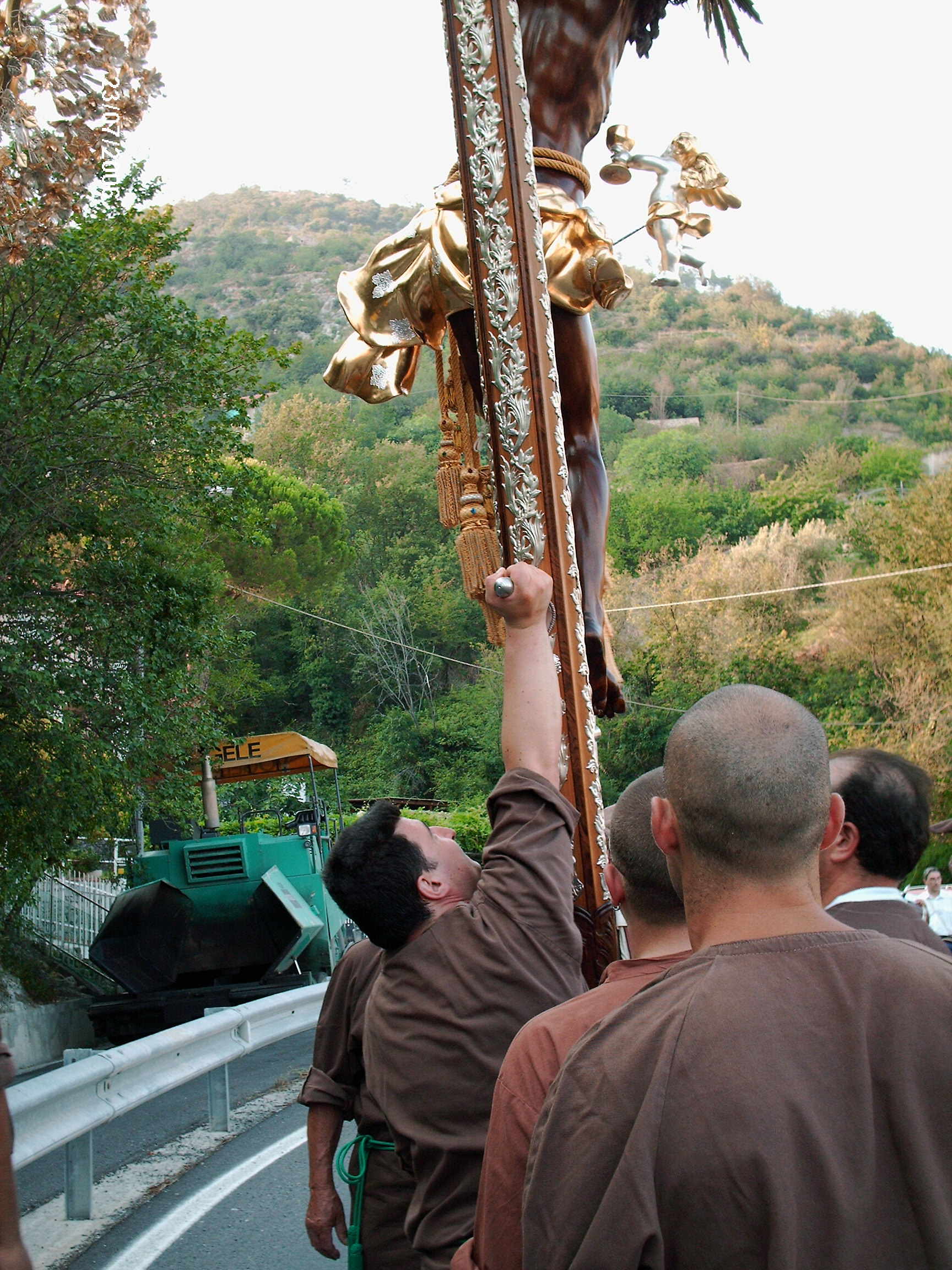 Stramuata al Cristo moro di Boissano